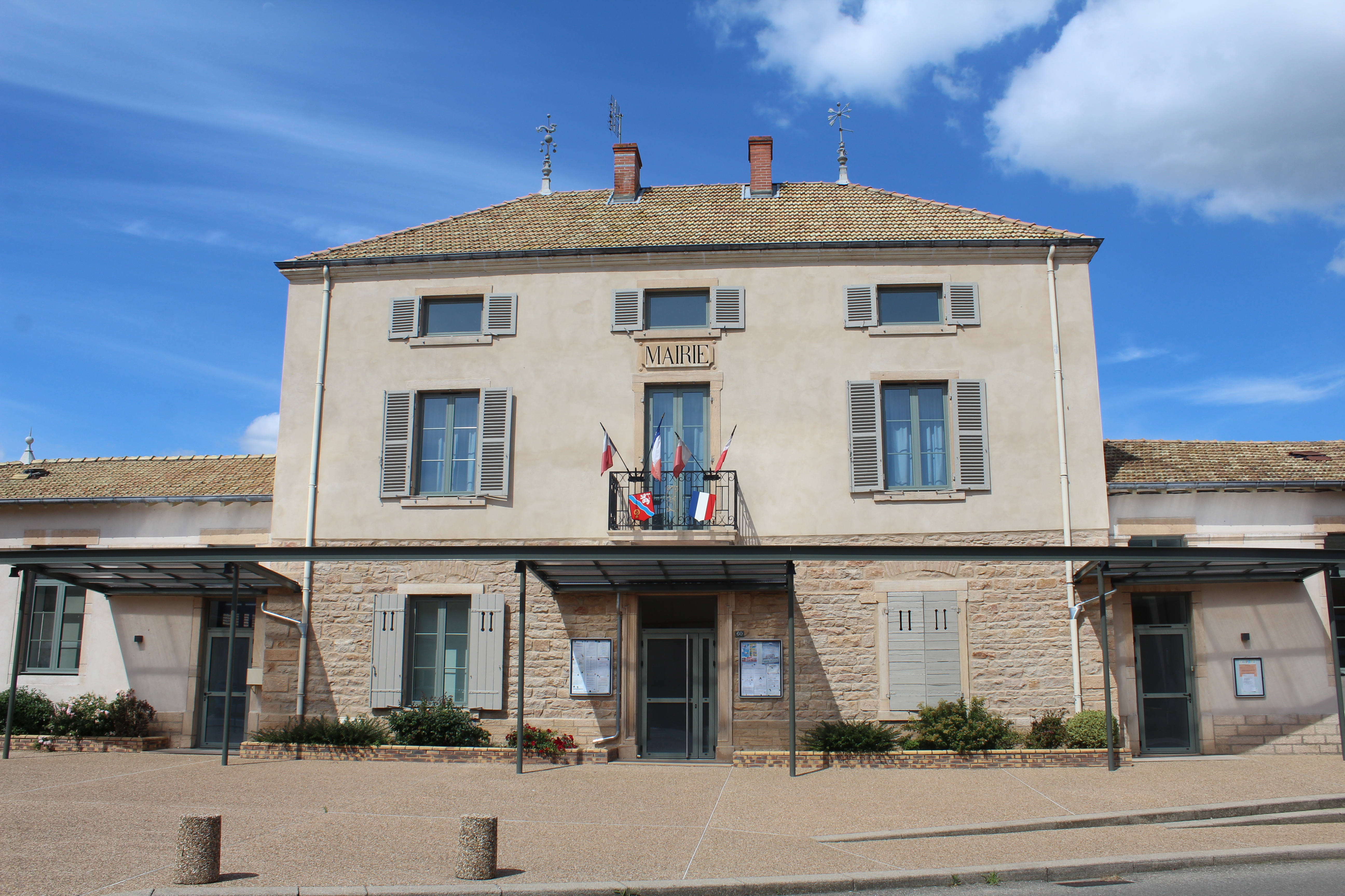 Mairie de la commune de Cormoranche-sur-Saône.